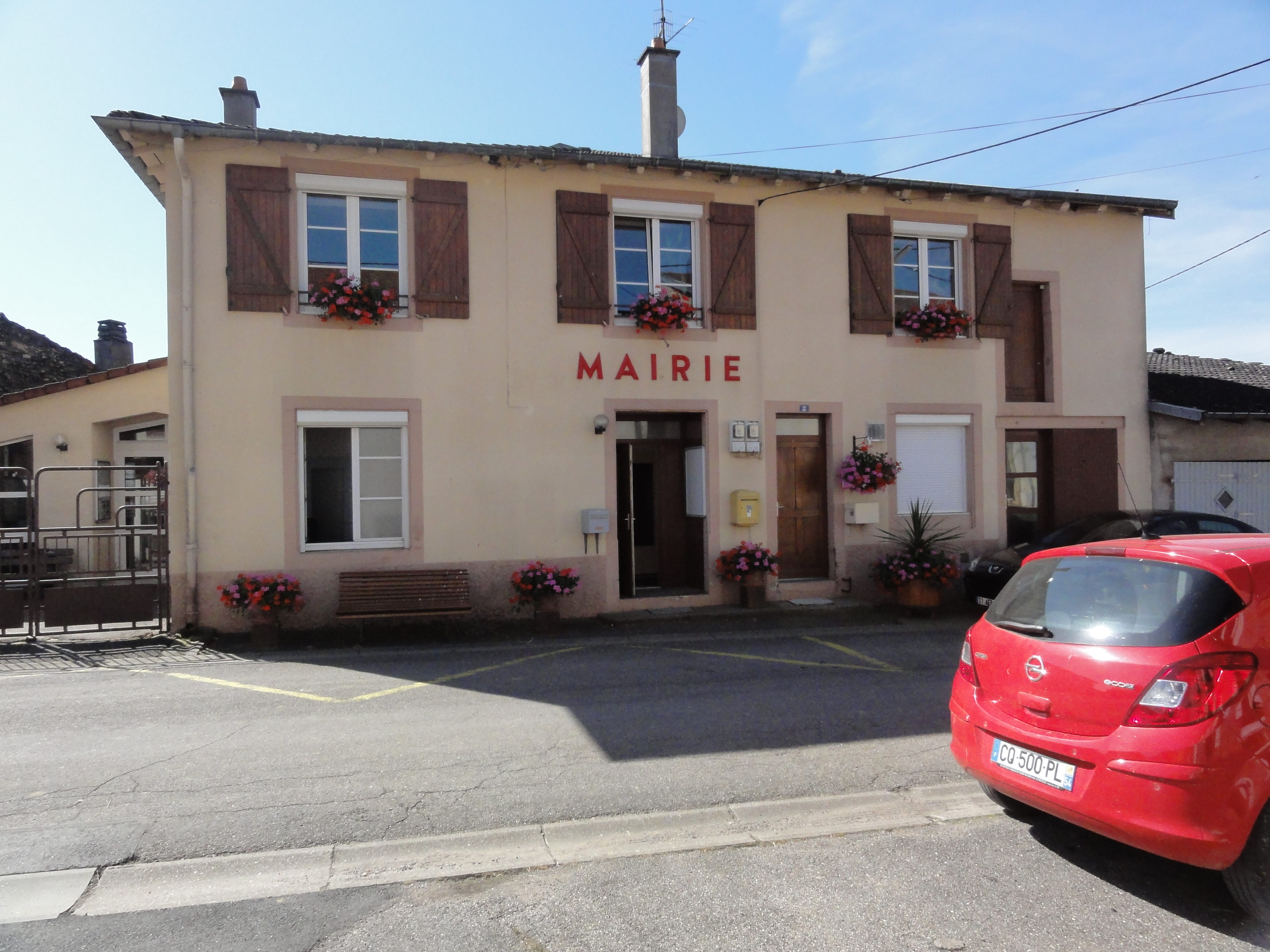 Brouville (M-et-M) mairie